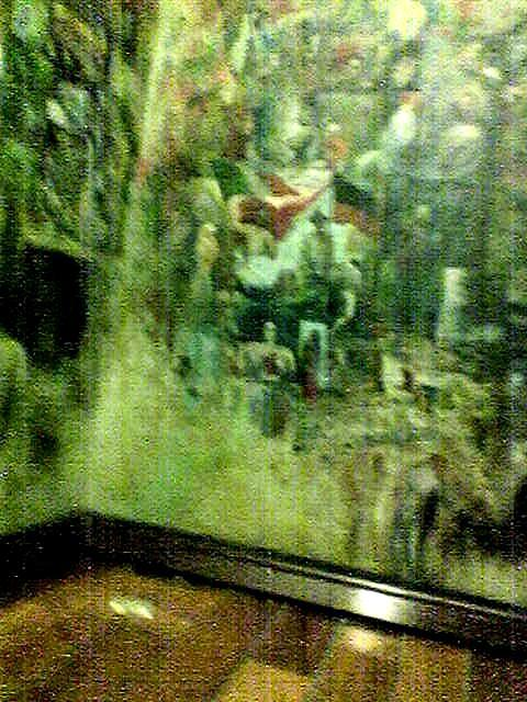 Mural del estudio de Joaquín Clausell